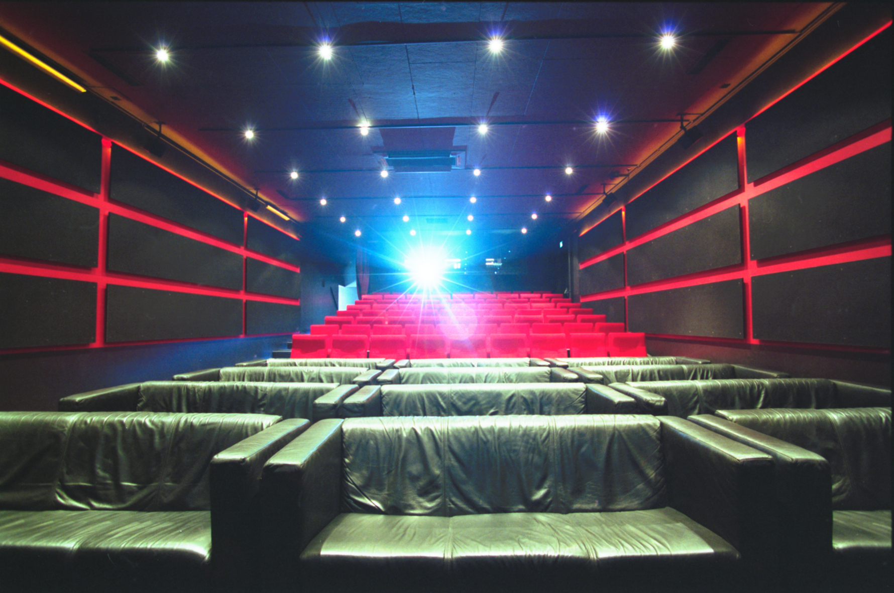 Kino Xenix, Zürich, innen